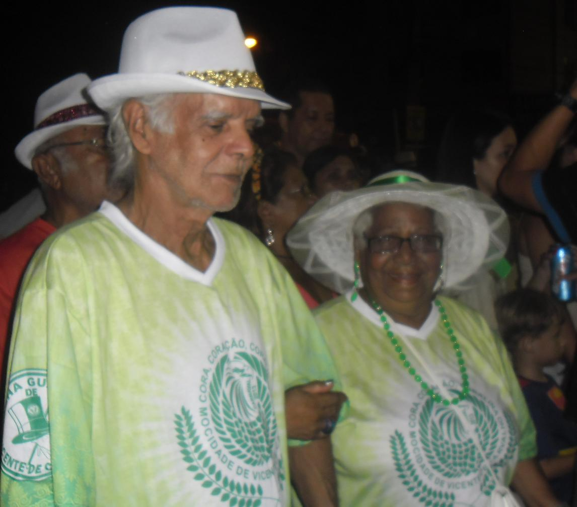 GRES Mocidade de Vicente de Carvalho